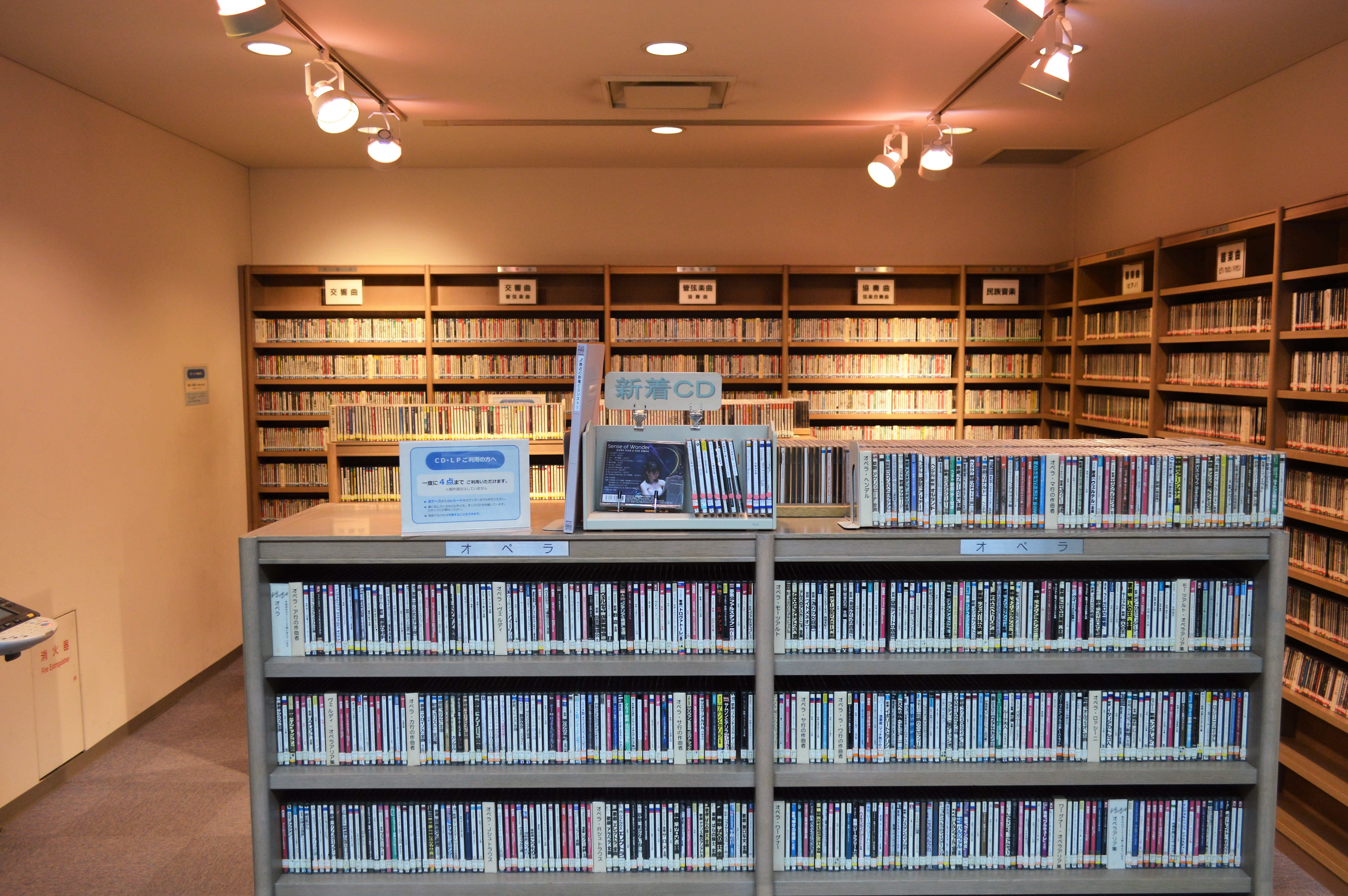 愛知県名古屋市東区東桜（栄）にある愛知芸術文化センターアートライブラリー。